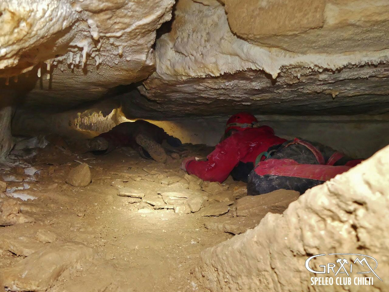 Esplorazione Parte superiore